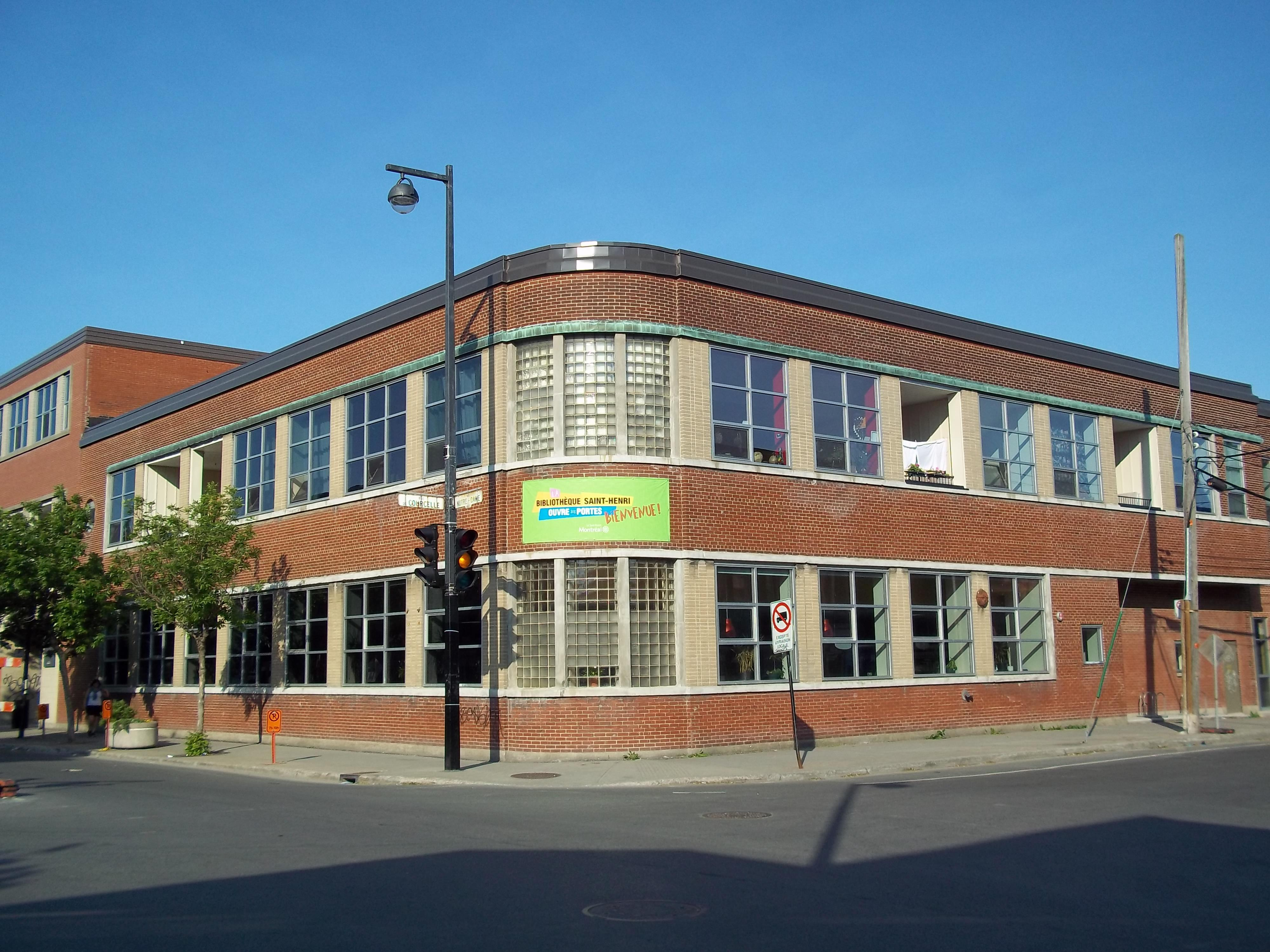 Bibliothèque Saint-Henri, rue Notre-Dame, Montréal